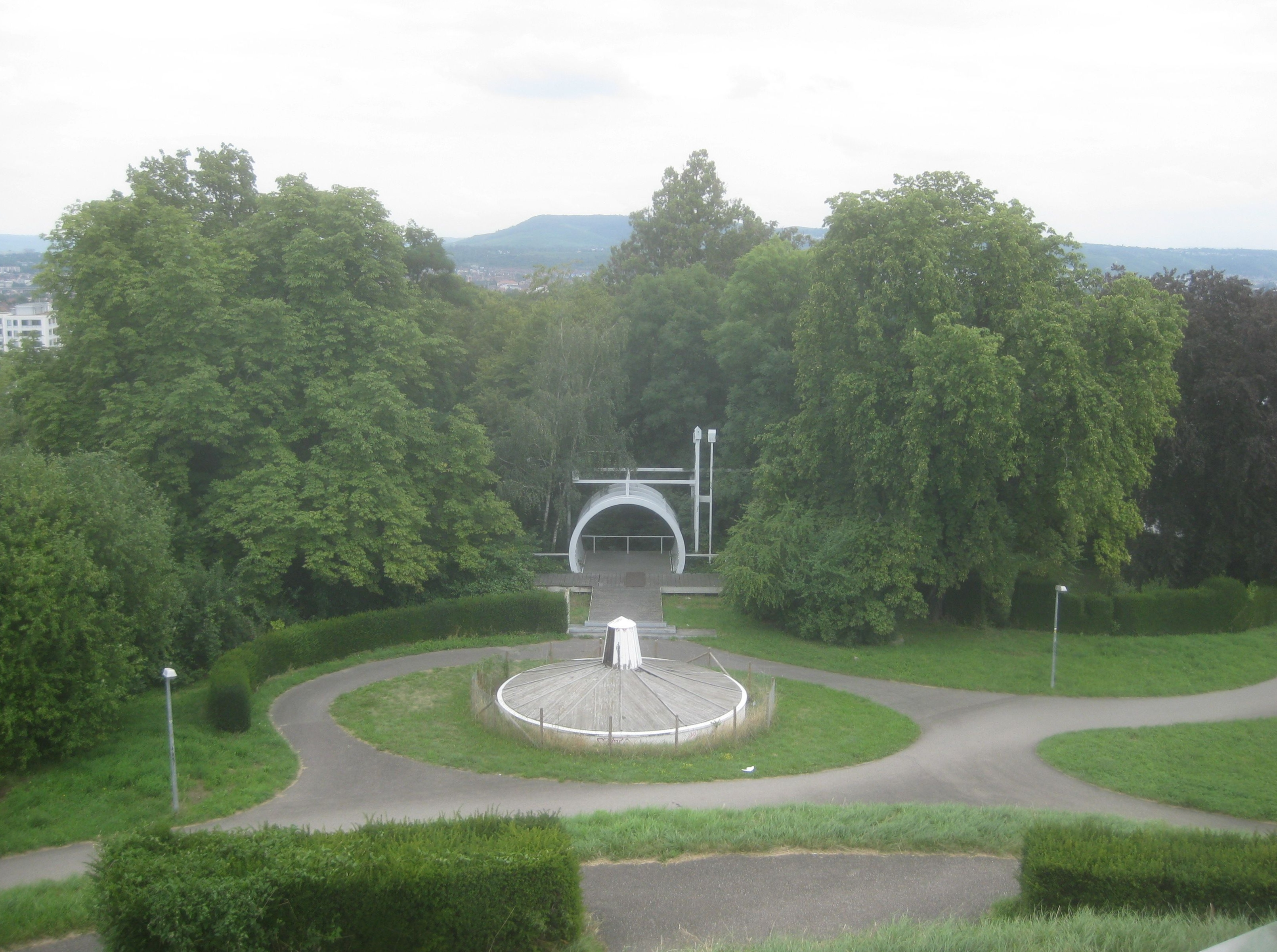 Haupteingang (Torbogen) zum Park der Villa Moser in Stuttgart („Laubentunnel“), davor ein ganzjährig holzverschalter Brunnen. Hinweis: Die Koordinaten geben die Position des Torbogens an.